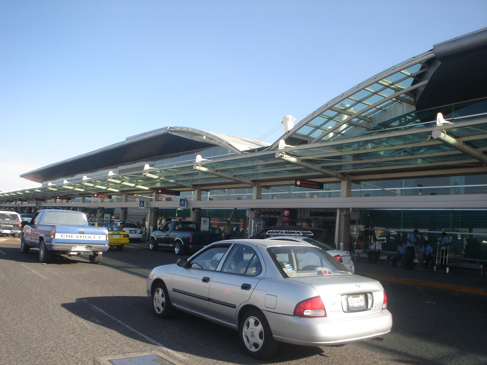 Fachada de la Terminal 1 del Aeropuerto de Guadalajara